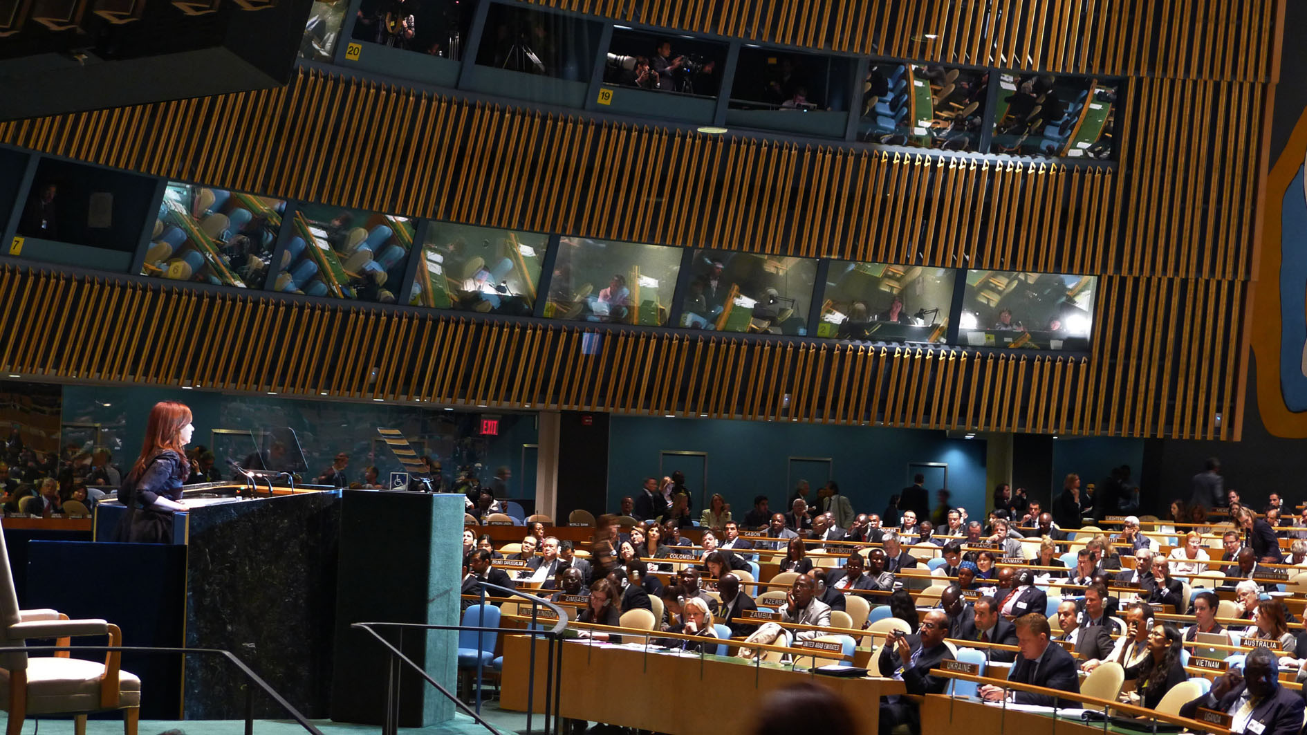 La presidenta Cristina Fernández habló ante la Asamblea General de Naciones Unidas (ONU), en un discurso en el que abogó por el diálogo sobre la soberanía de Malvinas y defendió el derecho de Palestina a ser tenido en cuenta como miembro de pleno derecho en la organización.